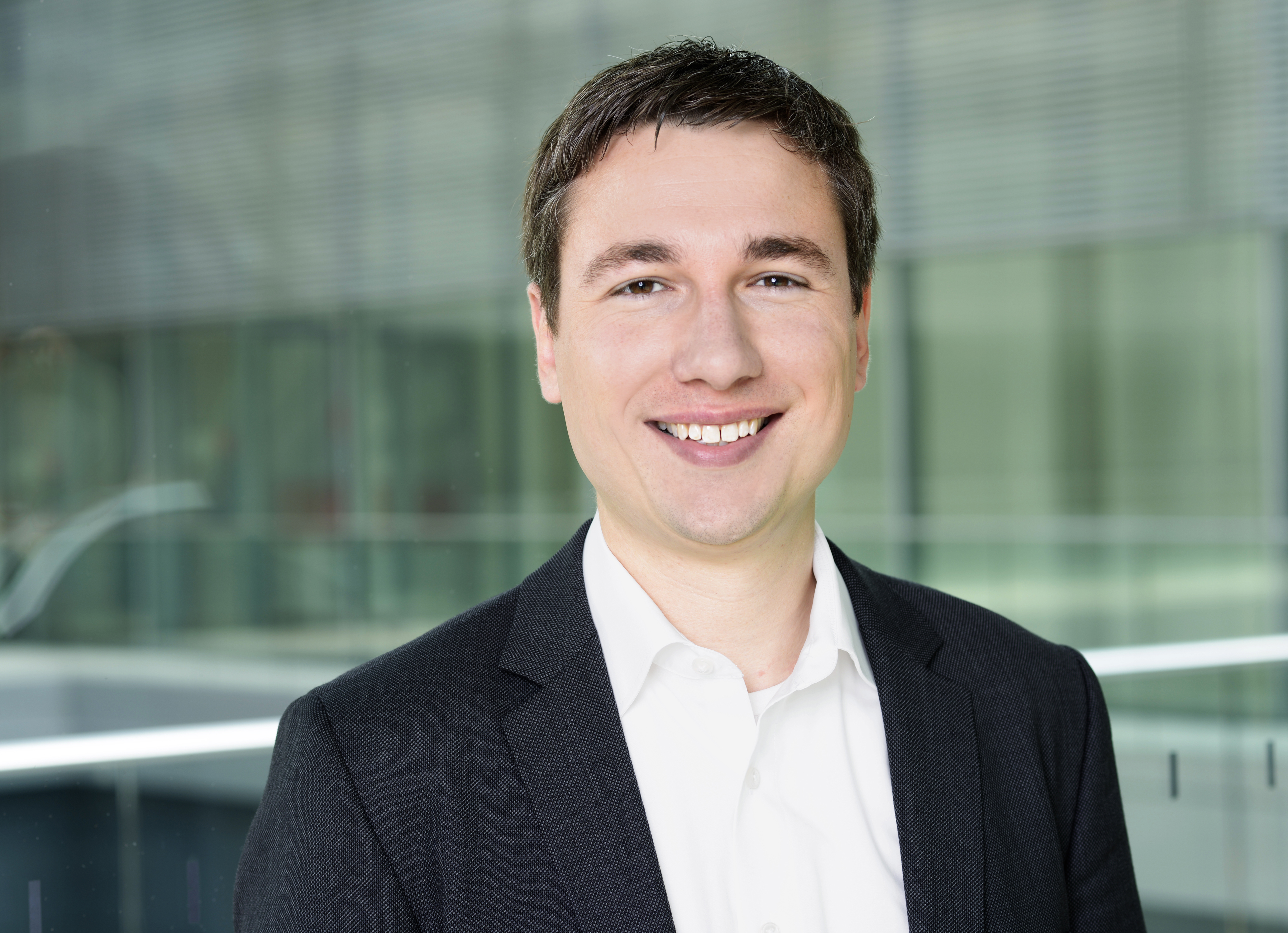 Sprecher für Verkehrspolitik Bündnis 90/Die Grünen im Bundestag